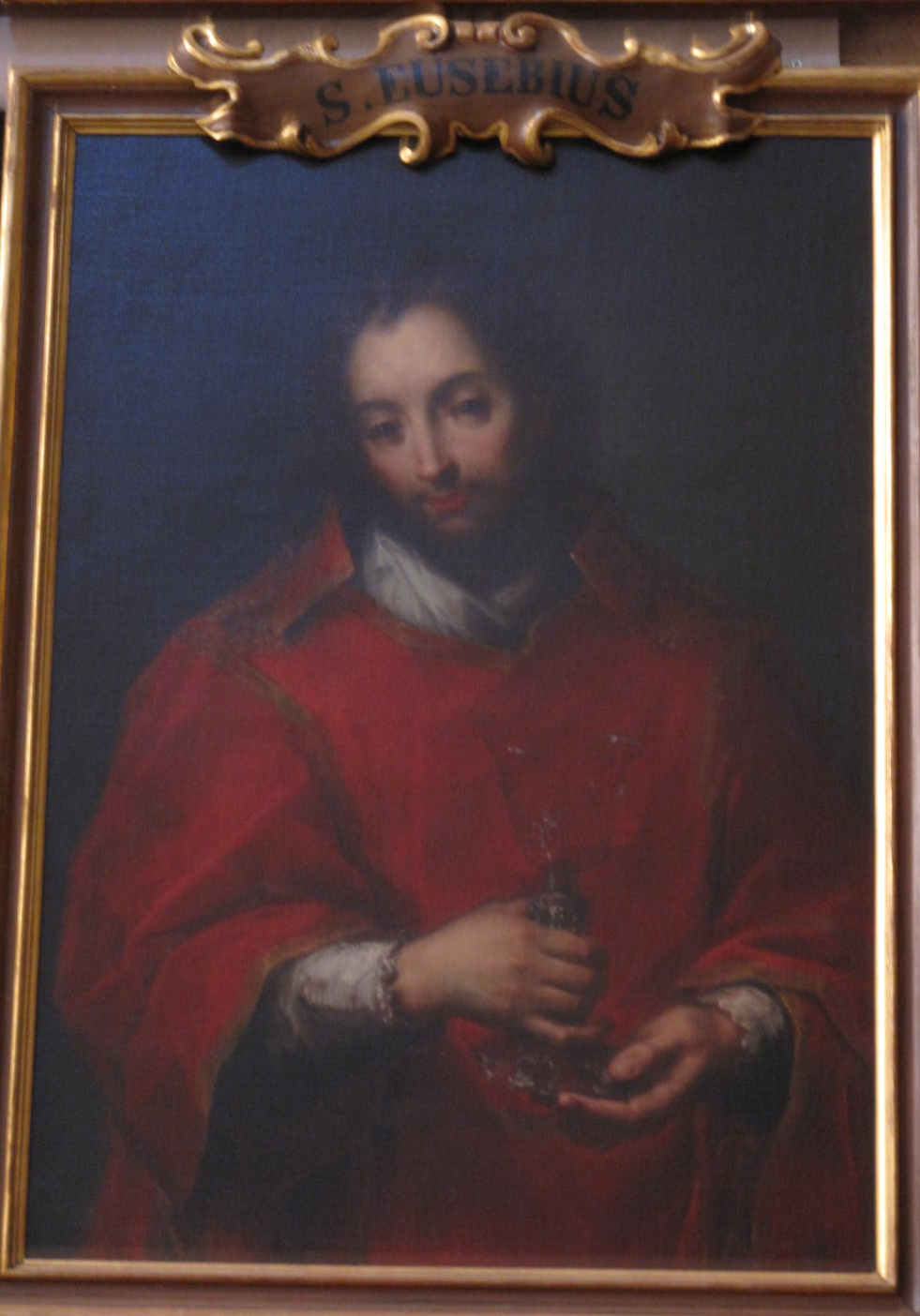 Anonymous 18th century painting of Saint Eusebius of Milan, Diocesan Museum of Milan